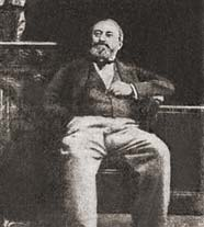 Петр Владимирович Долгоруков (1816-1868)